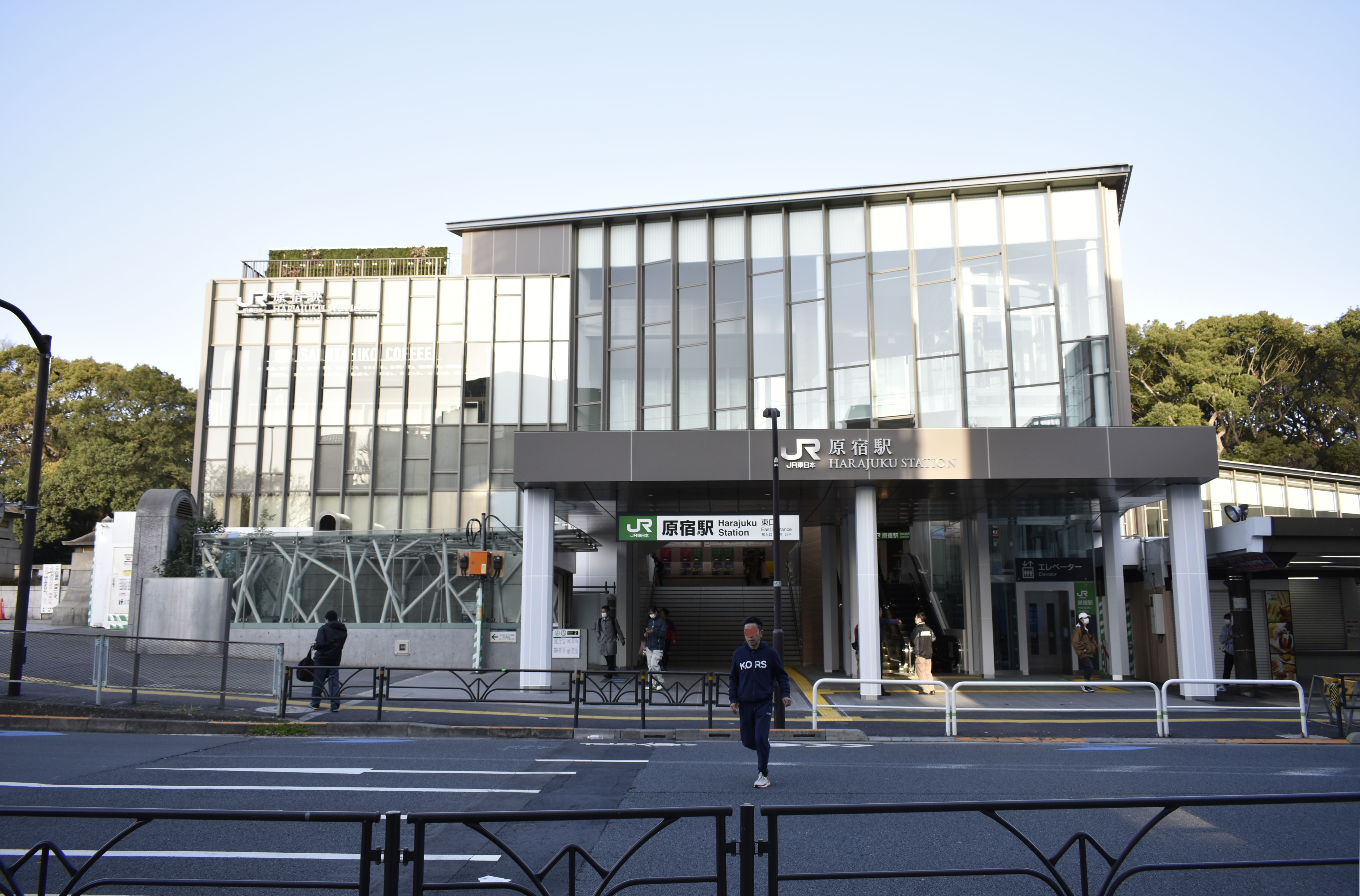 原宿駅 新駅舎 Nikon D3400